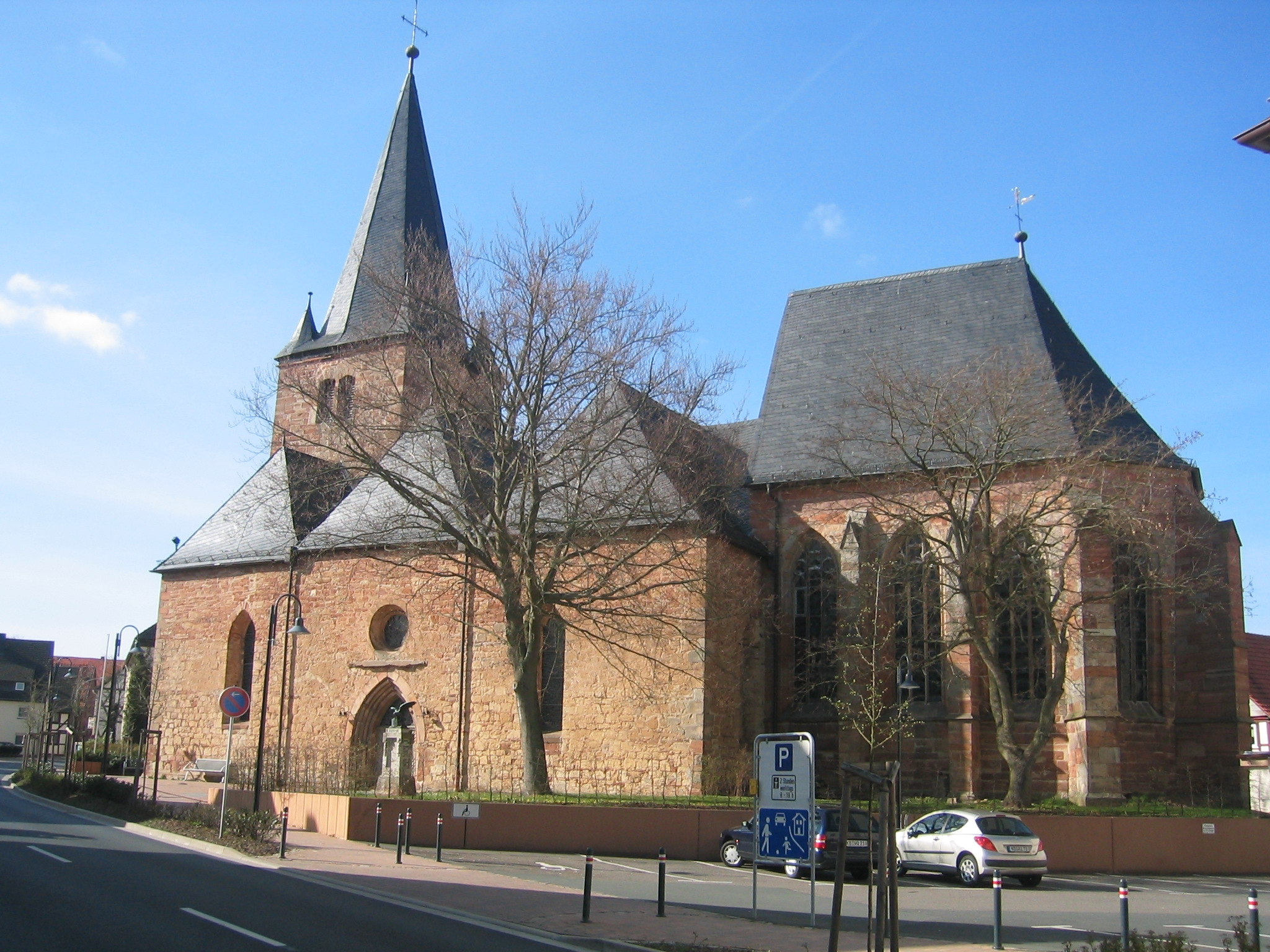 St. Nikolaus church in Sachsenhausen (Waldeck)